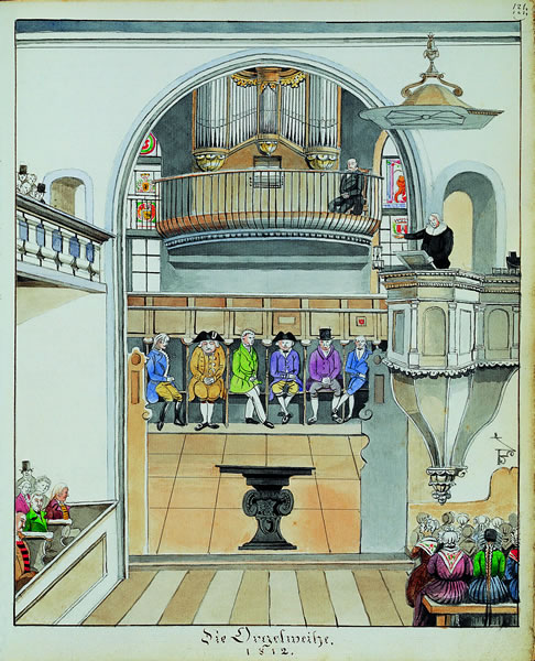 Der Berner Pfarrer Jeremias Lorsa predigt 1812 während der Orgeleinweihung in der Nydeggkirche. Vorne sitzen links die Männer und rechts die Frauen. Hinten auf den Bänken des Chores sitzen Mitglieder des Patriziats. Zeichnung von Karl Howald.